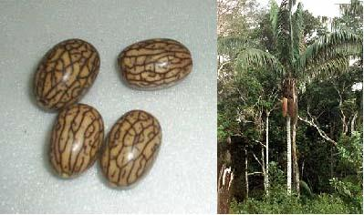 Patauá da Amazônia